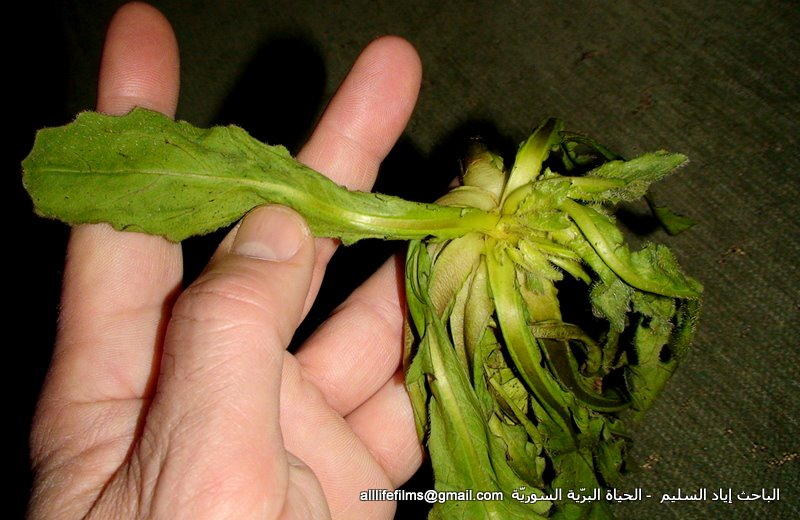 نباتات برية سورية تؤكل